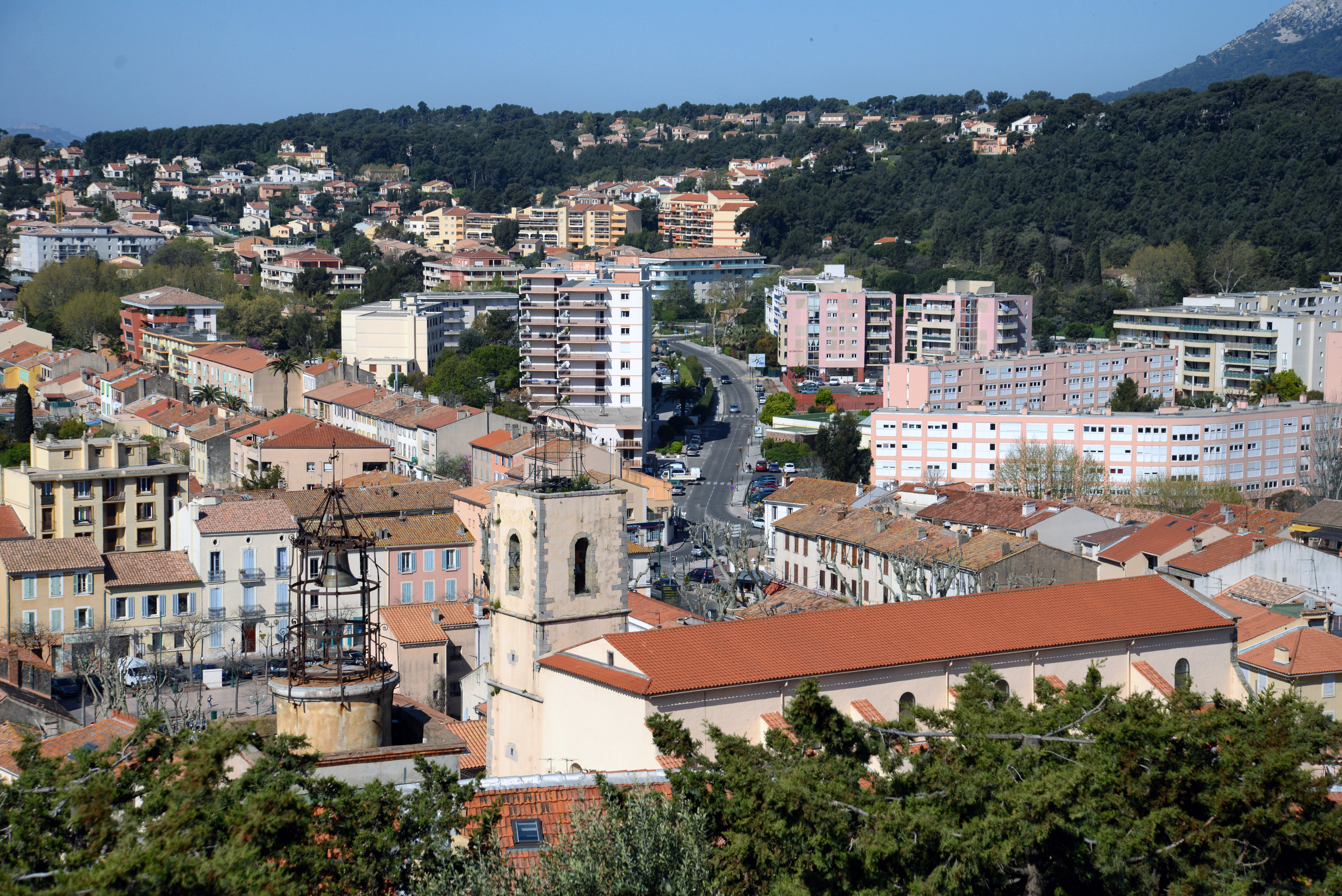 La Garde, Var (Provence) - Vue des quartiers Ouest de la ville, depuis le promontoire rocheux où se trouvait l'ancien castrum